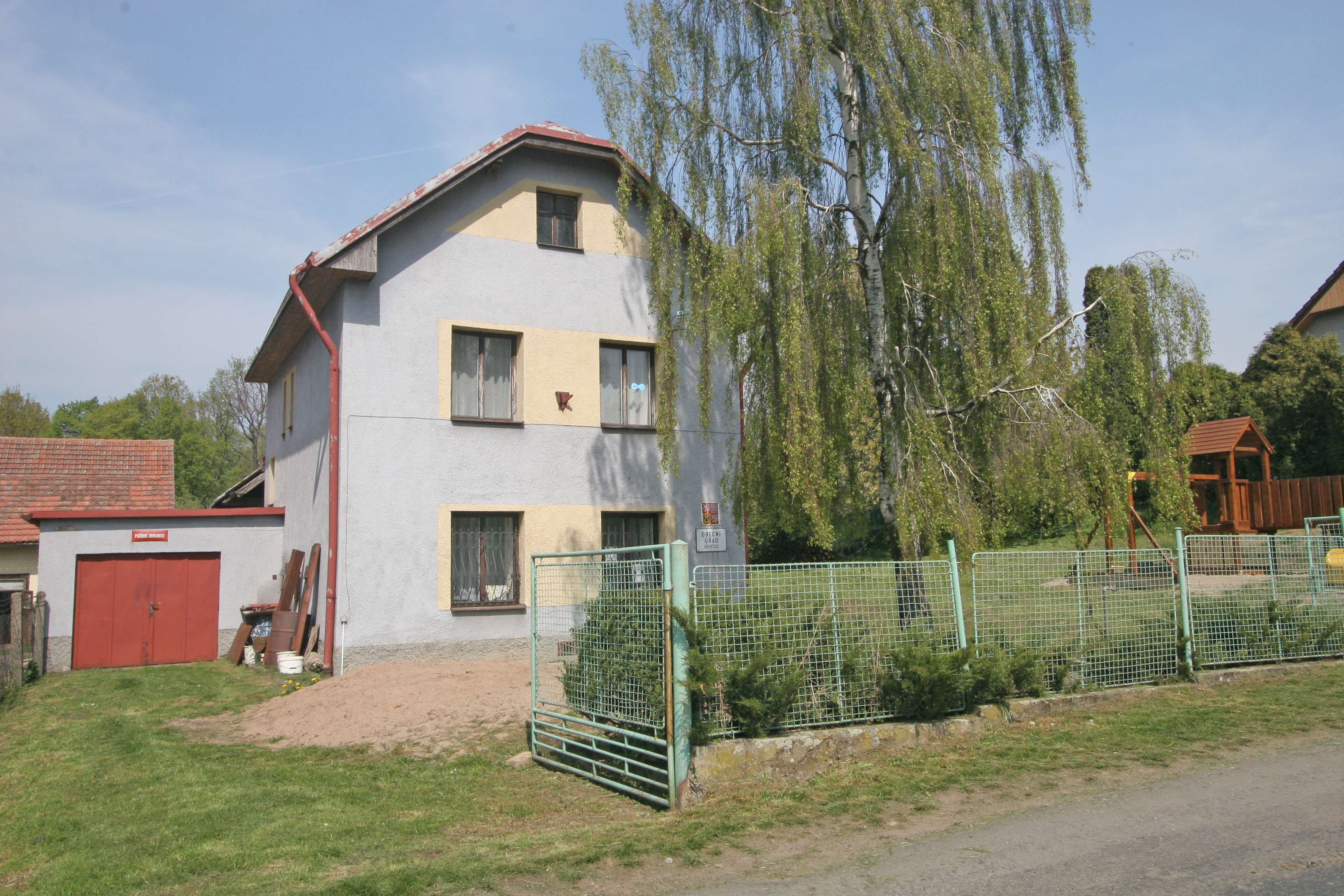 Úherčice obecní úřad